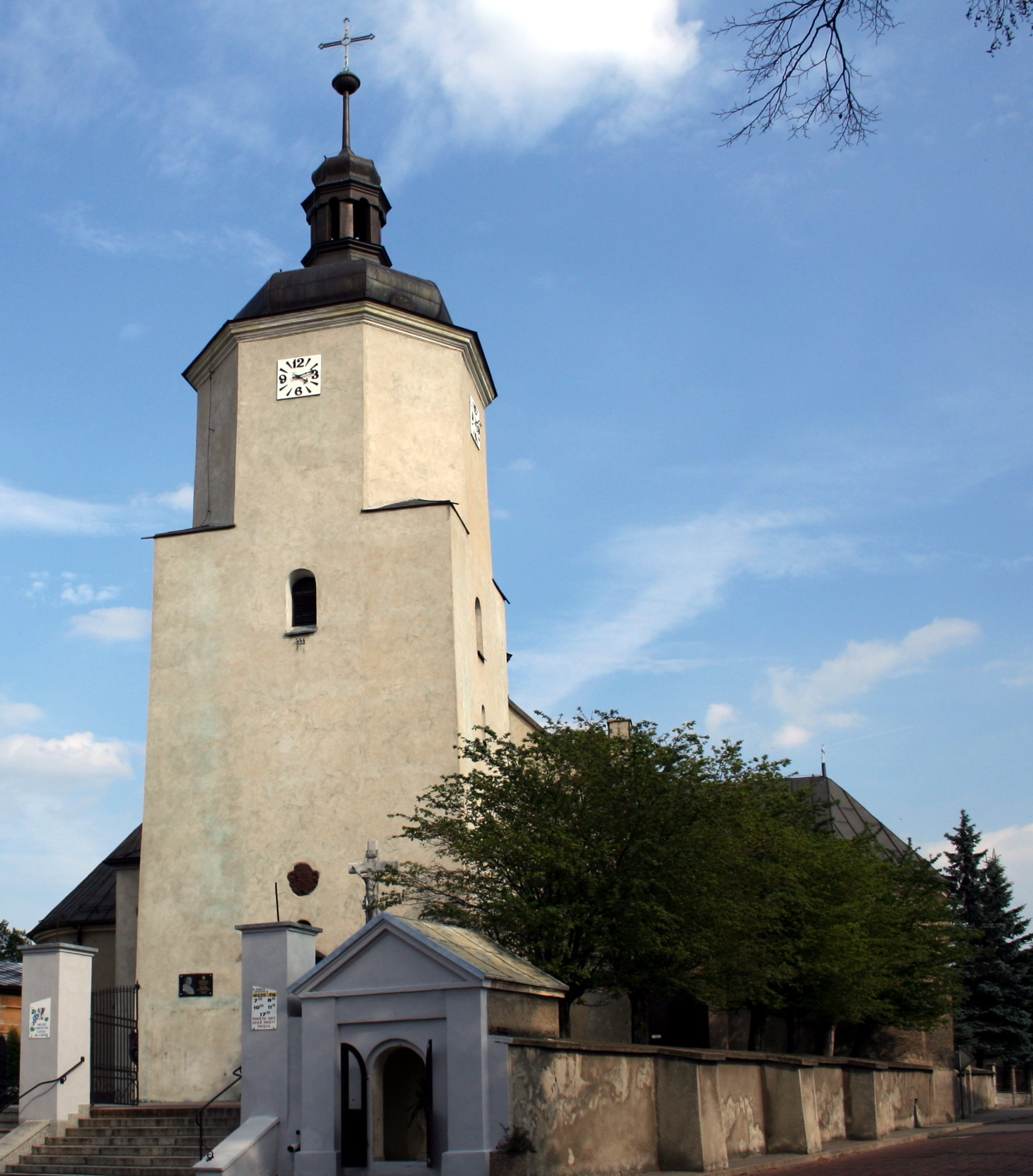 Kościół św. Katarzyny w Woźnikach, powiat lubliniecki